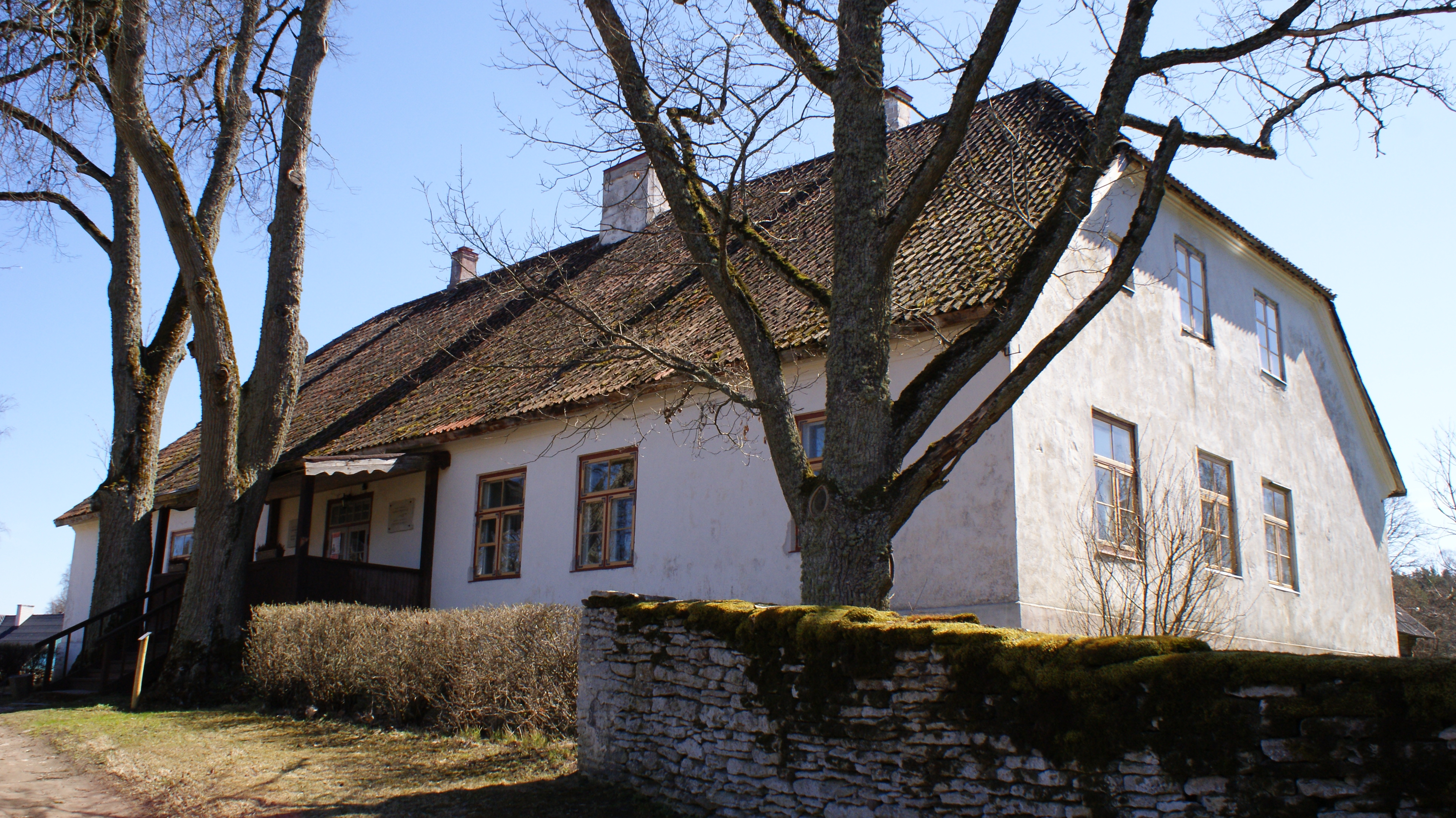 Kuusalu pastoraadi peahoone